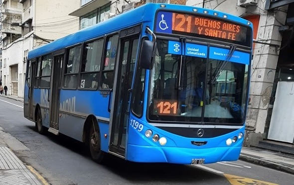 Unidad de la empresa Movi, explotadora de la línea 121 del Transporte Urbano de Pasajeros de Rosario.